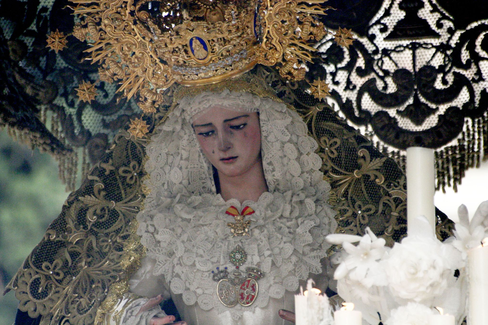 Nuestra Señora de Gracia y Esperanza. Semana Santa en Sevilla. Año 2006 Foto realizada y propiedad de Ángel Chacón